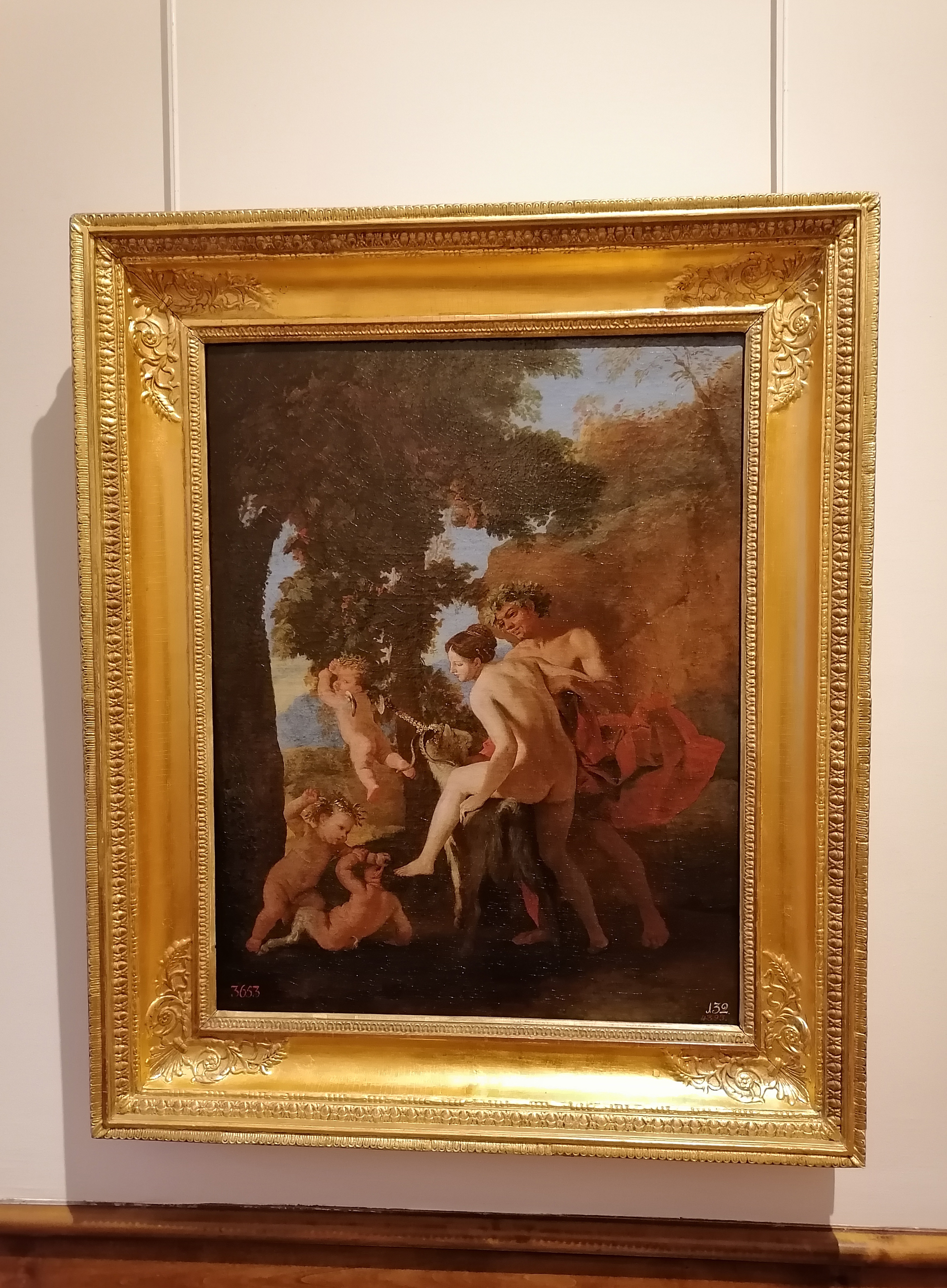 Зимний дворец - зал 279